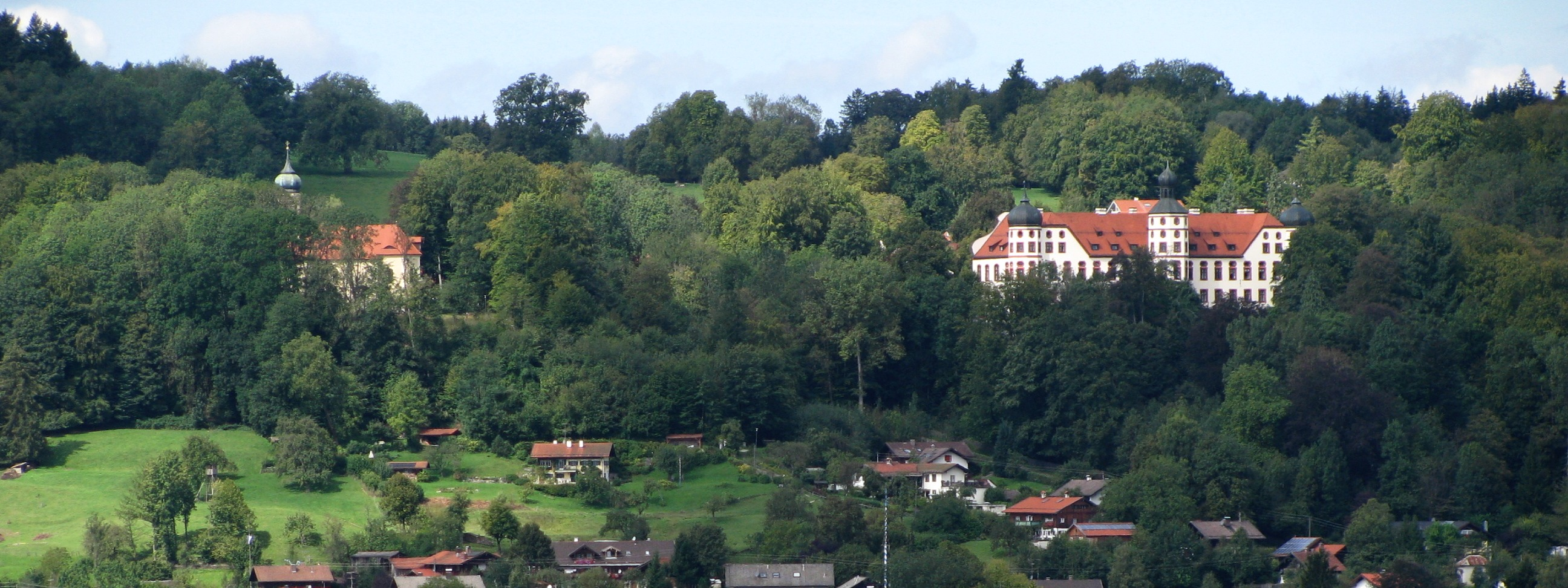 Blick von Herrnhausen über das Loisachtal auf Eurasburg mit Schloss und Kirche Mariä Empfängnis